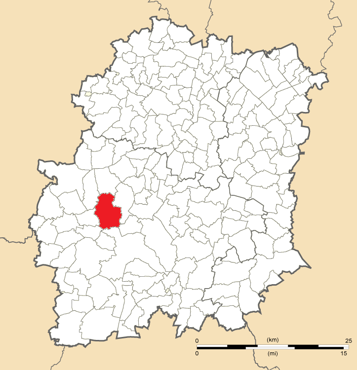 Carte de position de Boissy-le-Sec en Essonne (91)